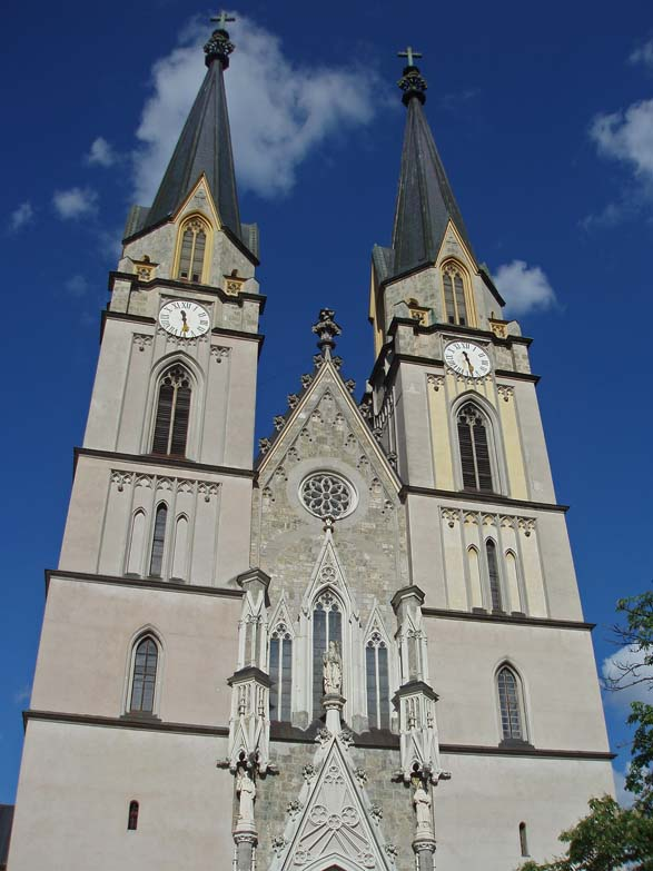 Stiftskirche Admont